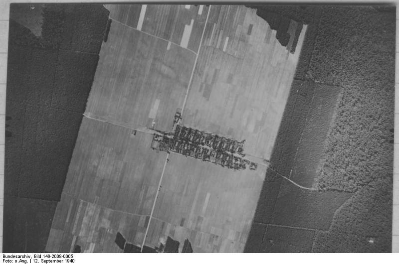 Tempelhof, AKI 3180, 118/500 Frei RLM 12.9.40